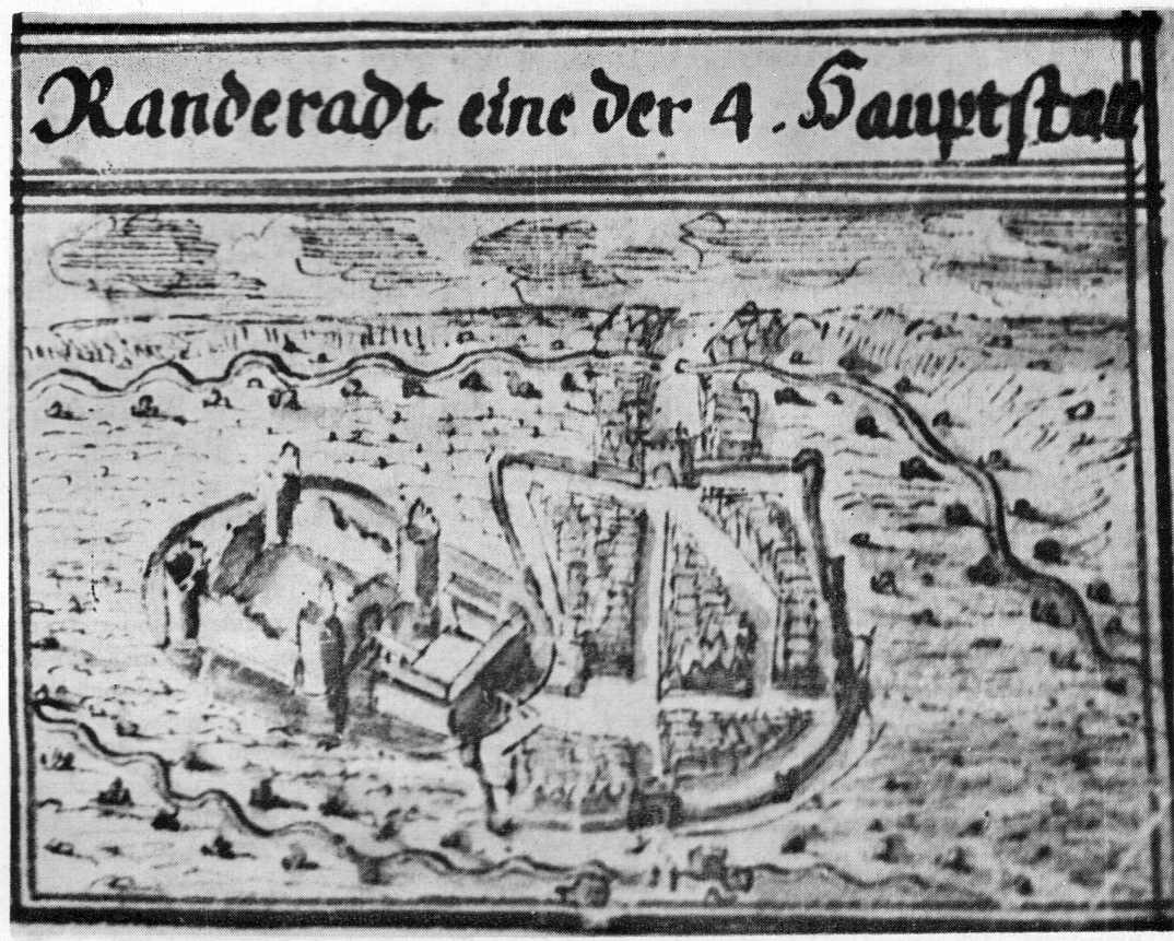 Randerath (mit falscher Bezeichnung als 4. Landeshauptstadt)